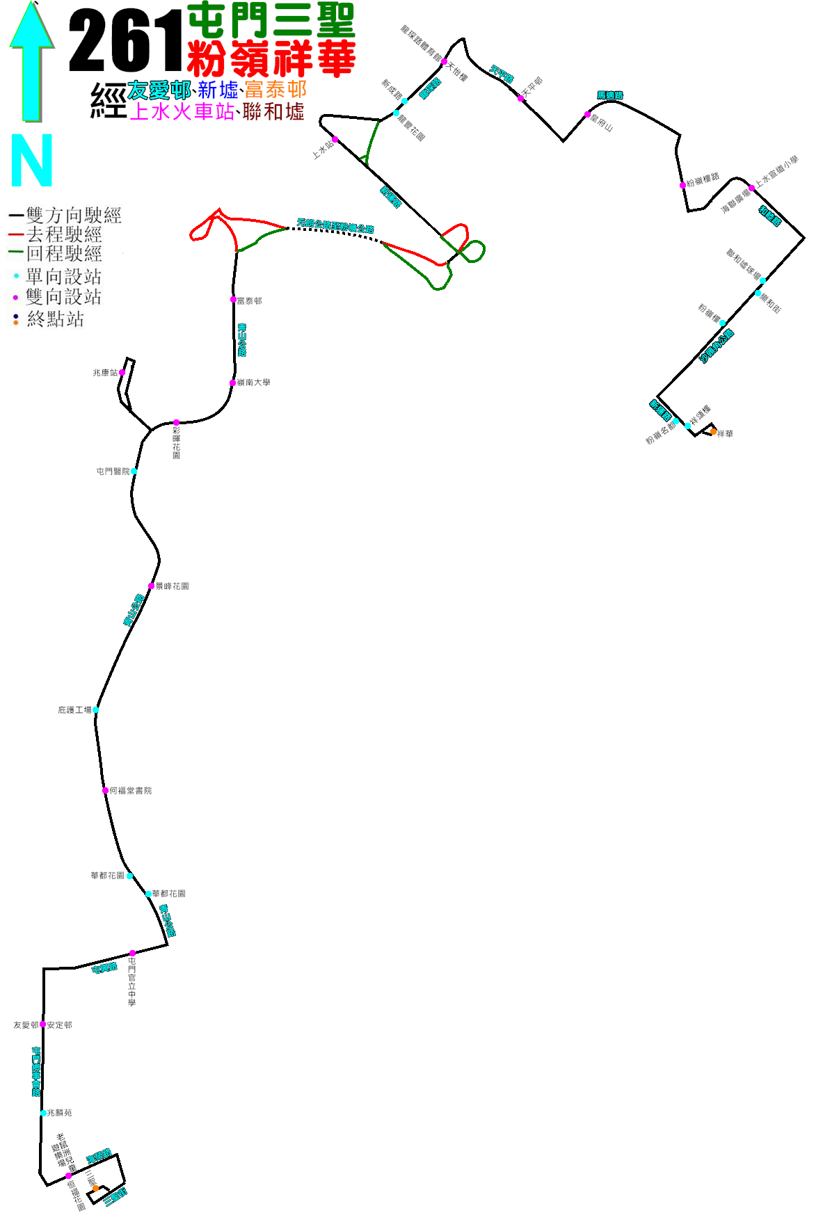 中文（香港）: 九巴261線的走線圖